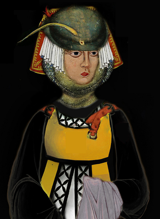 Yolande de Bourgogne comtesse de Nevers